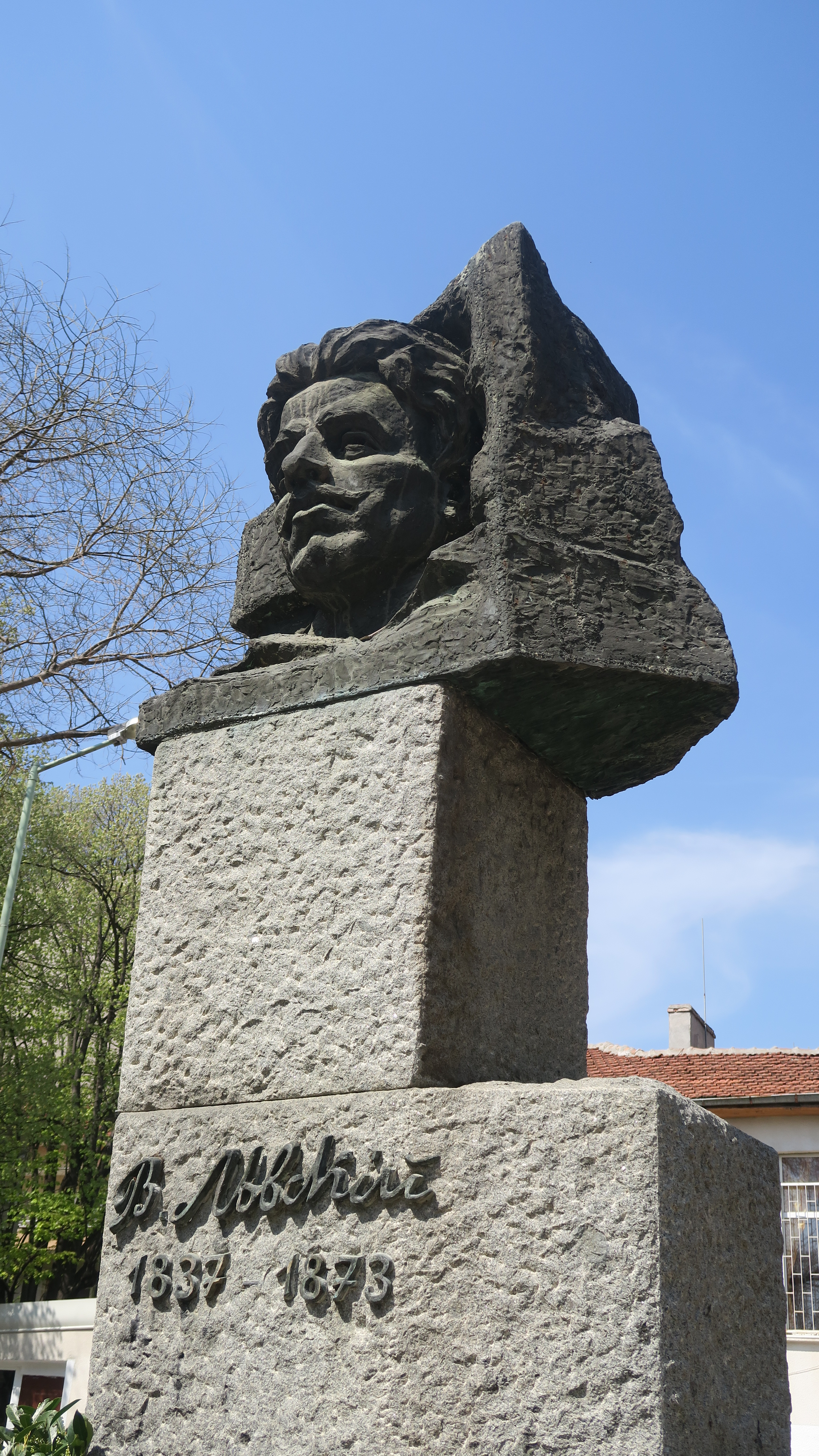 Паметник на Васил Левски (Стара Загора)